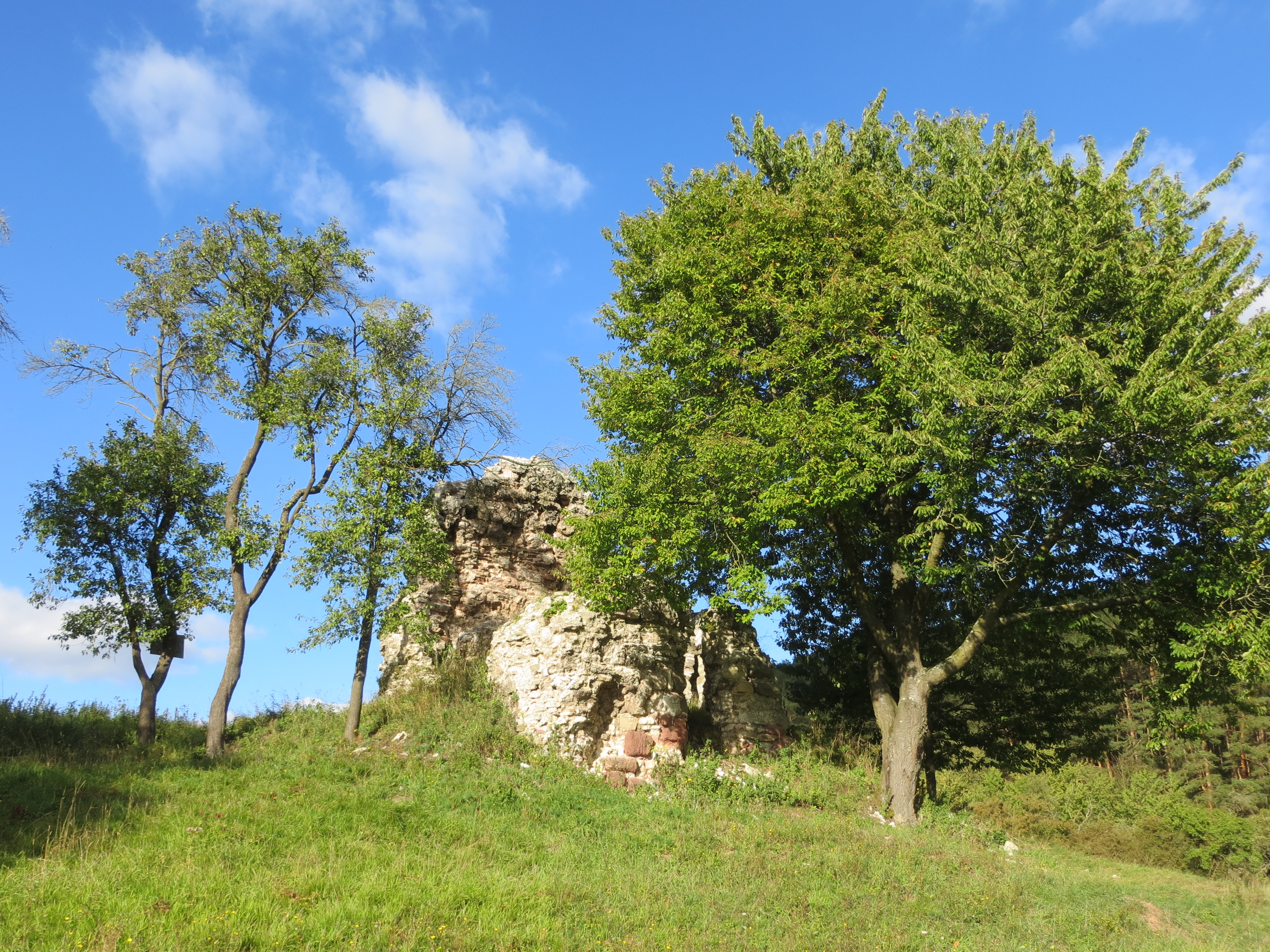 Wüste Kirche „Bernecke“ St. AndreasThis is a photograph of an architectural monument. 84527